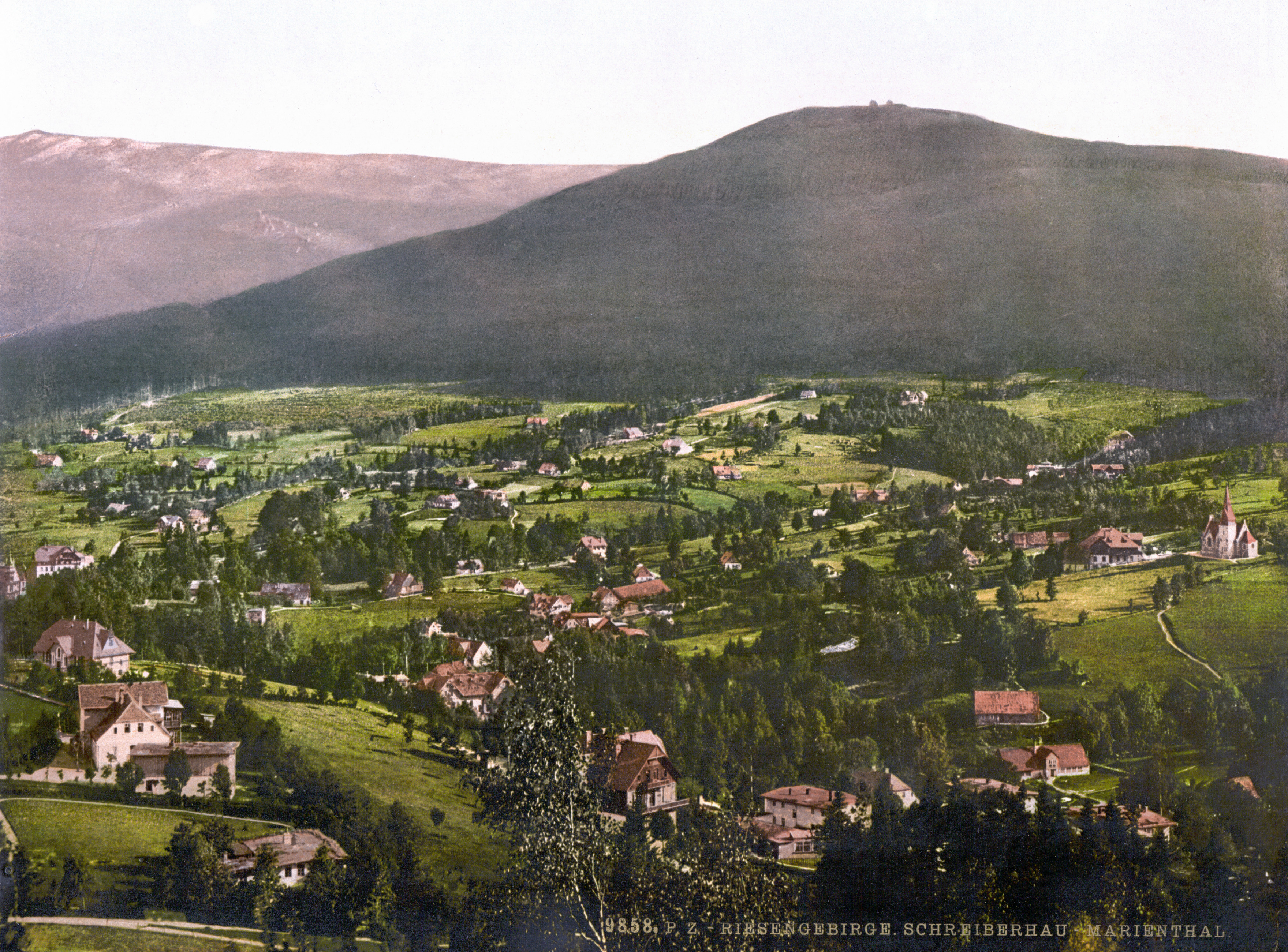 Schreiberhau Mariental um 1900